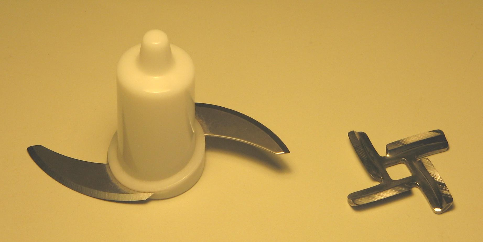 Tranĉiloj, kiuj estas partoj de aparatoj kaj ne estas uzataj senpere per manoj. Mi, aŭtoro de la bildo, permesas al ĉiuj uzi ĝin kun ĉi tiaj kondiĉoj